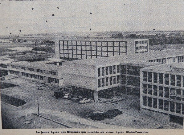 Photo aérienne du lycée Alain-Fournier en construction